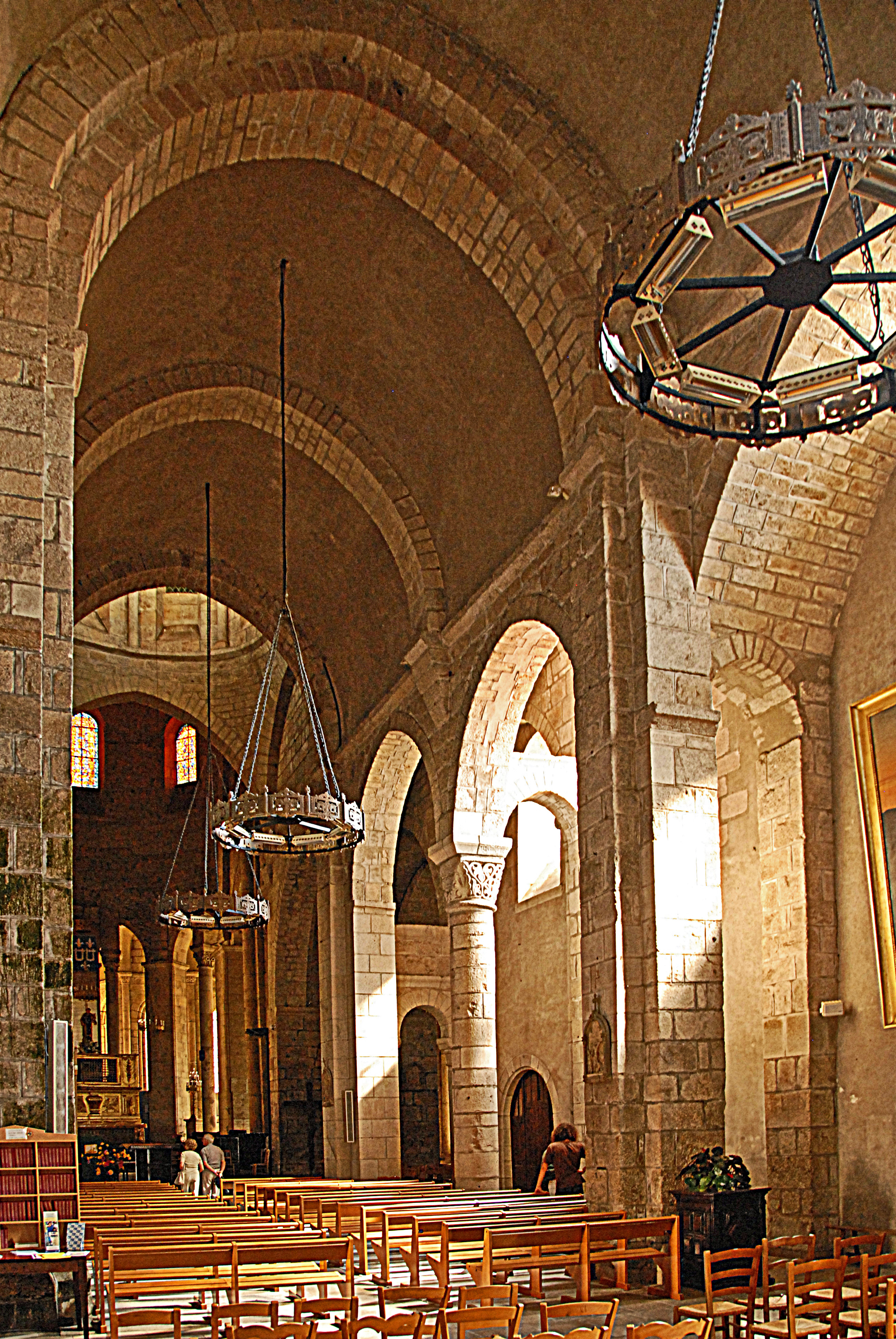 Stiftskirche St.-Léonard-de-Noblat, Langhaus, Südwand, ab Joch 3 zum Chor